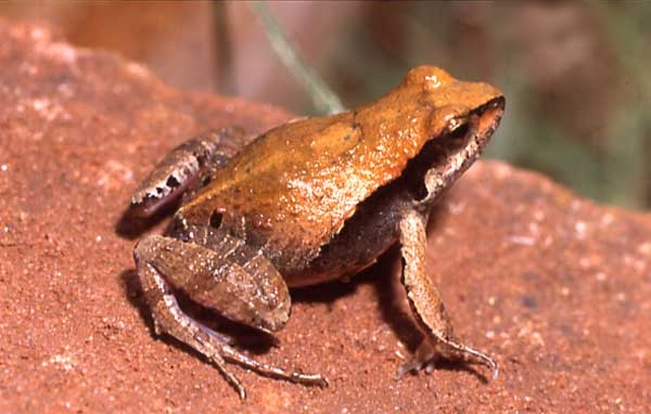 Physalaemus gracilis